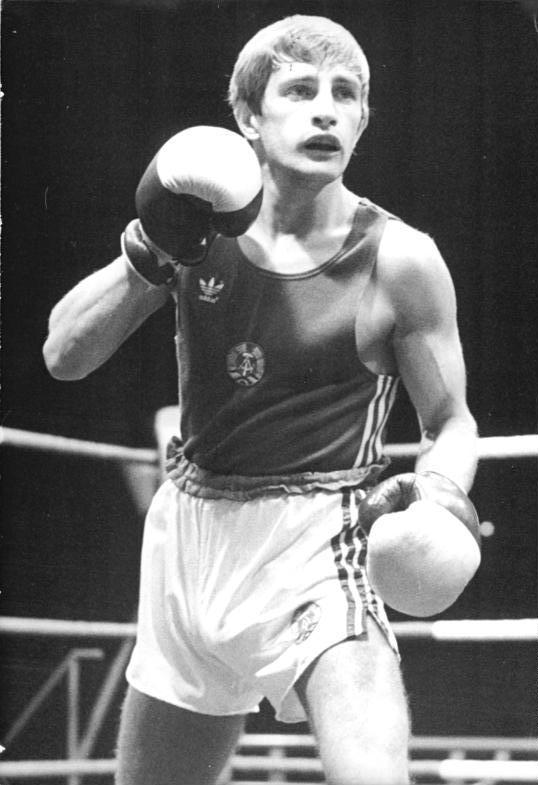 Dietmar Geilich ADN-ZB Settnik 23.9.83 Berlin: Vorschaumotiv zum 14. Internationalen Boxturnier von Berlin- Der 29jährige zweimalige Vize-Europameister Dietmar Geilich (ASK Vorwärts Frankfurt-Oder-Foto vom TSC-Turnier 1982) wird zum zehten Mal beim Berliner Boxturnier dabei sein. Seit 1974 gewann der Halbfliegengewichtler in Berlin vier Gold-, eine Silber- und vier Bronze-Medaillen.